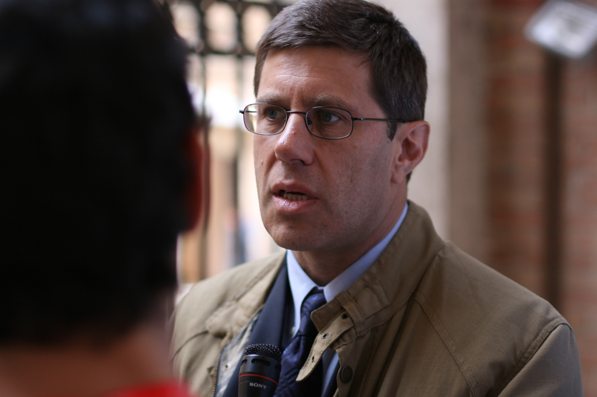 Oliviero Bergamini